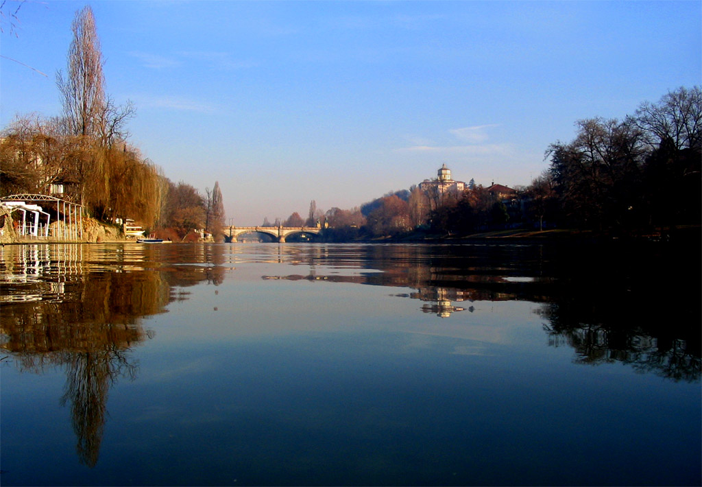 Po river,Torino, Italia